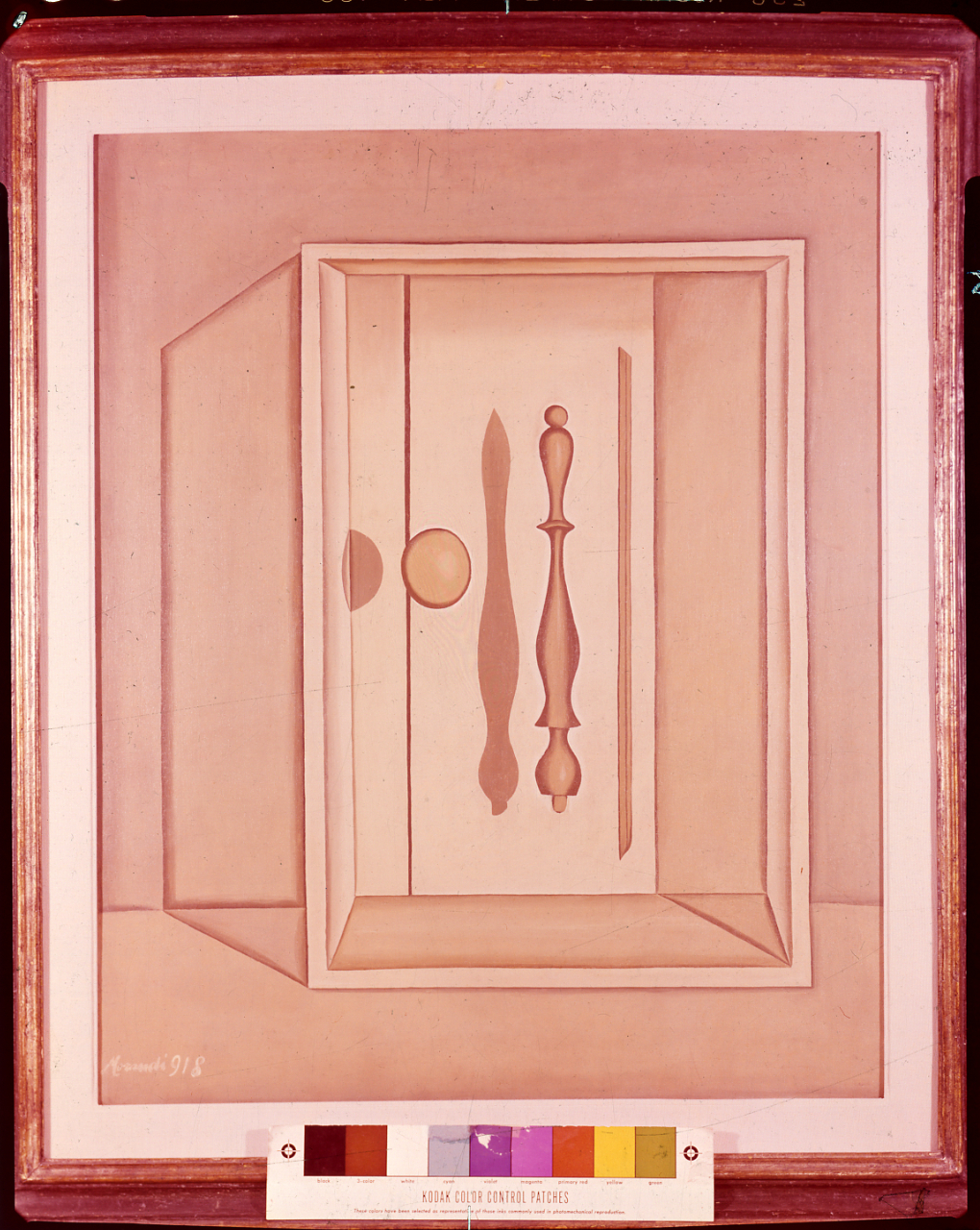 Giorgio Morandi, "Natura Morta", 1918, dipinto; "Simultaneità", 1912, dipinto; "Meditazione mattutina", 1912, dipinto. CollezioneRiccardo Jucker. Servizio fotografico : Milano, 1967 / Paolo Monti. - Buste: 3, Fototipi: 3 : Diapositiva, sviluppo cromogeno/ pellicola ; 10x12. - ((Serie costituita da 3 buste sciolte di diapositive identificate con i nn.: 908, 909, 911. - Dentro ogni busta foglio in carta bianca con iscrizione didascaliche e documentarie manoscritte a penna, tra cui: "Lett. Ital. IX-2", "Lett. Ital. IX-3", "Lett. Ital. IX-11". - Occasione: Documentazione per la pubblicazione: Cecchi Emilio, Sapegno Natalino (a cura di), "Storia della Letteratura Italiana", 9 voll., Milano, Garzanti, 1966 e segg. - Fonte: Rubrica di Paolo Monti: Archivio 10x12 (ultimi numerati) - dal G1 al (s.d.), presso Archivio Paolo Monti. - Fonte: Monografia di Cecchi Emilio, Sapegno Natalino (a cura di): Storia della Letteratura Italiana, 9 voll., Milano, Garzanti (1966 e segg.)